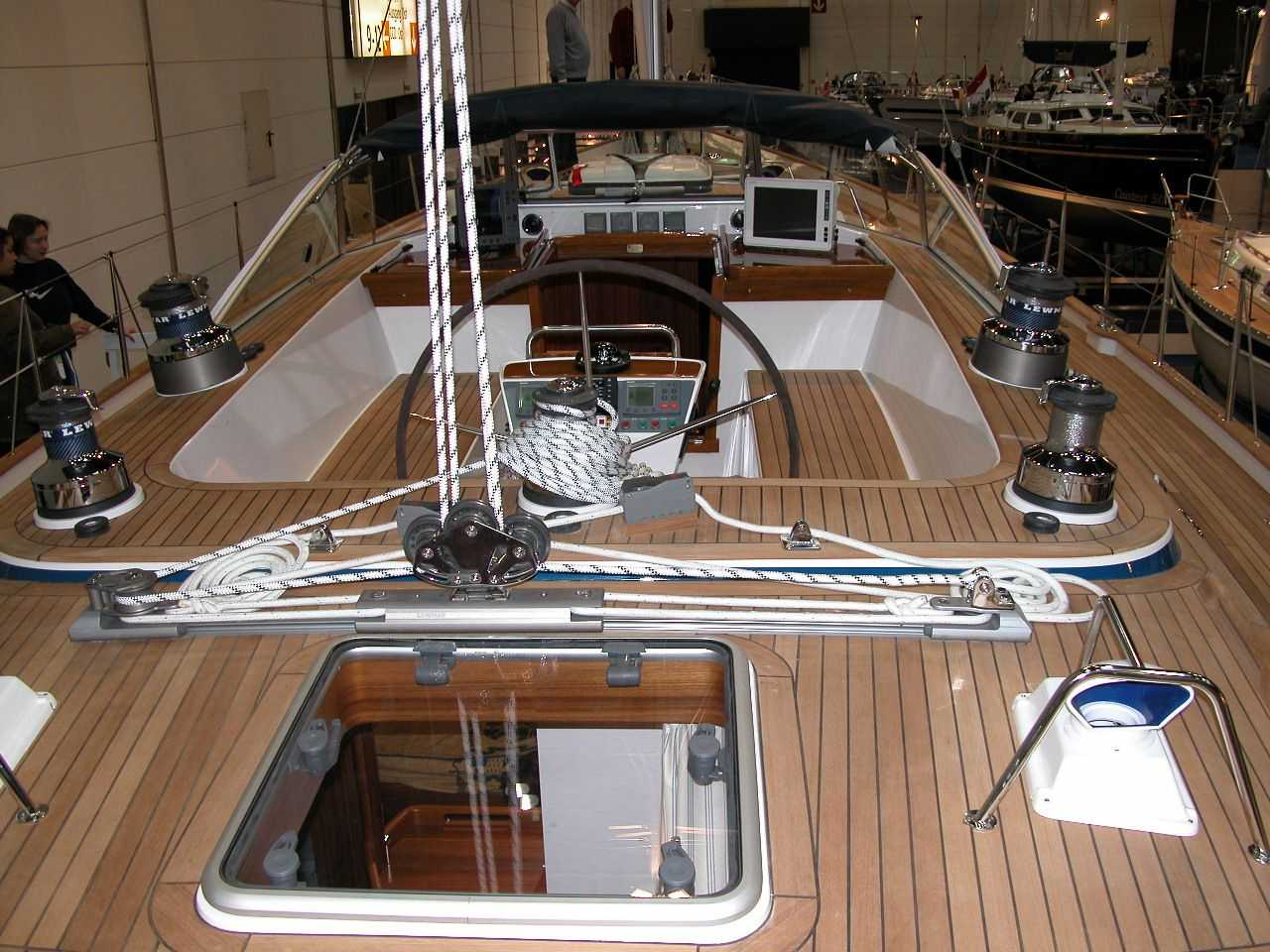 Cockpit HR62